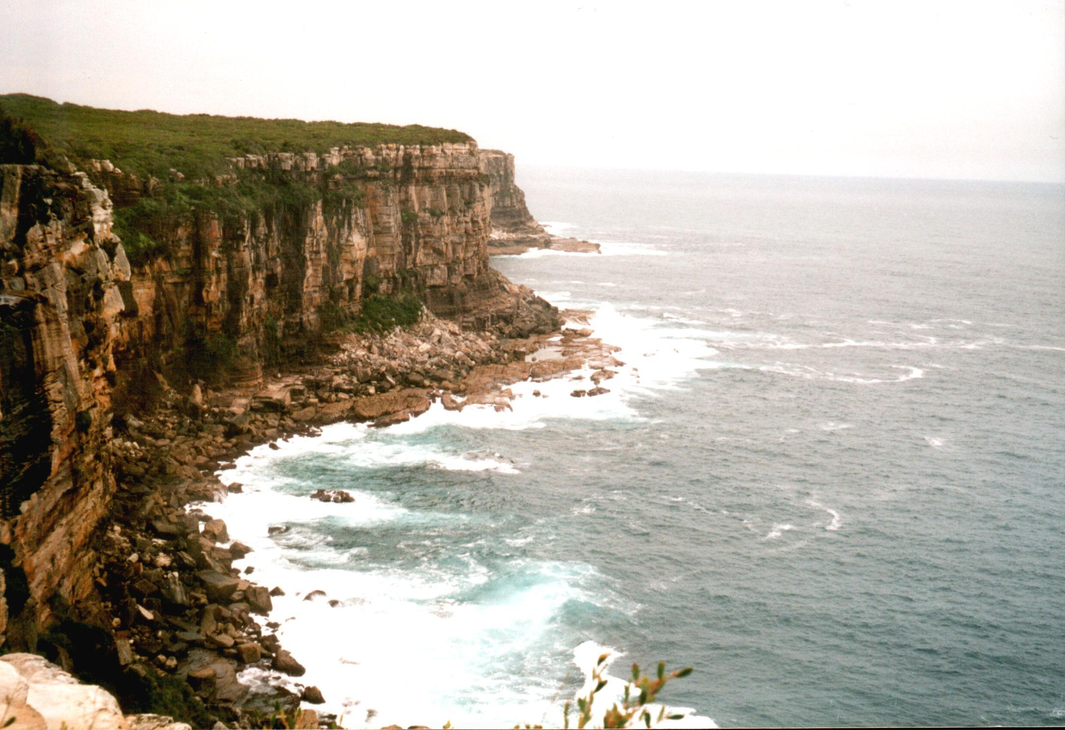 North Heads, Sydney